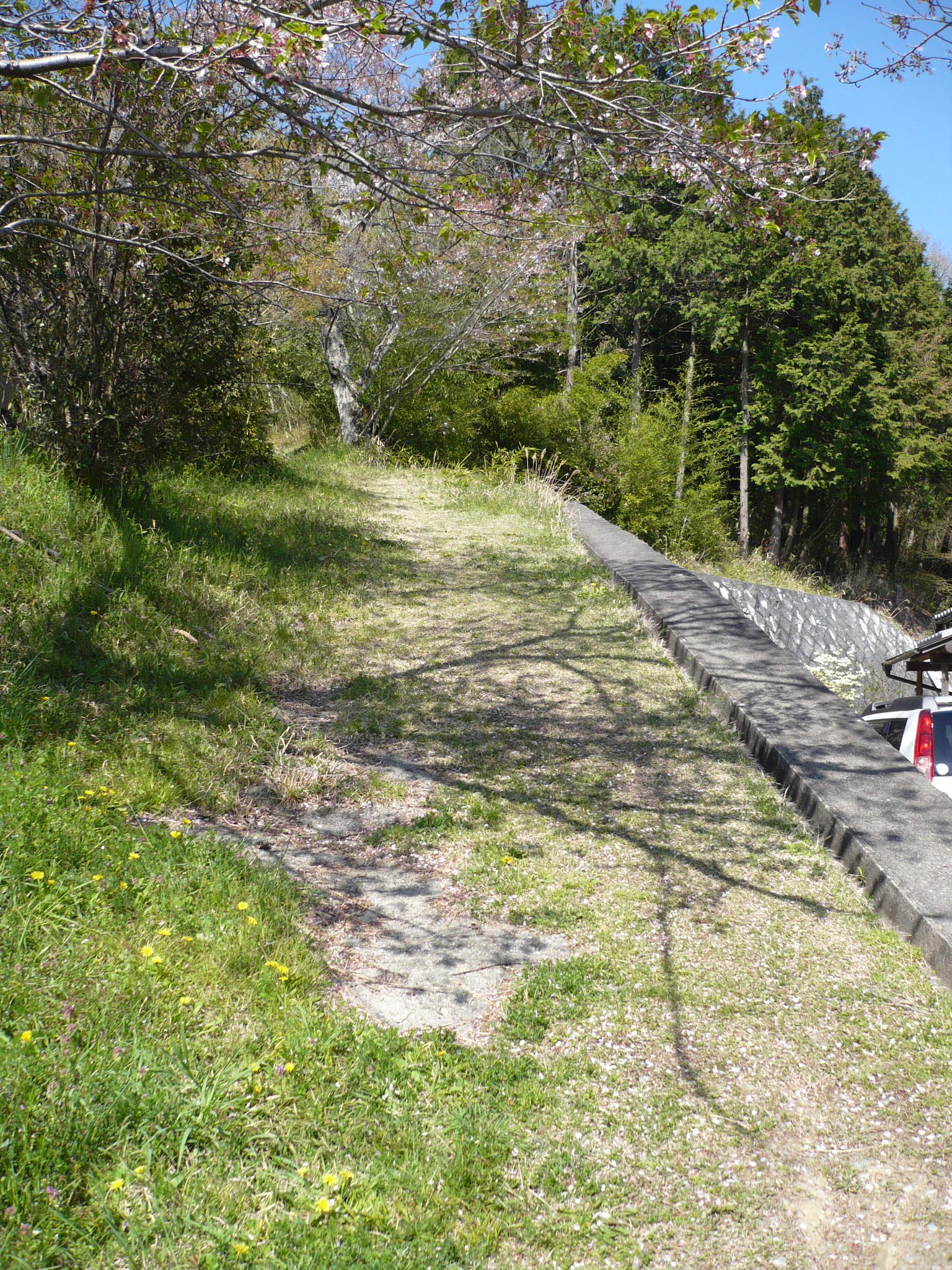 古城山の登山口入り口